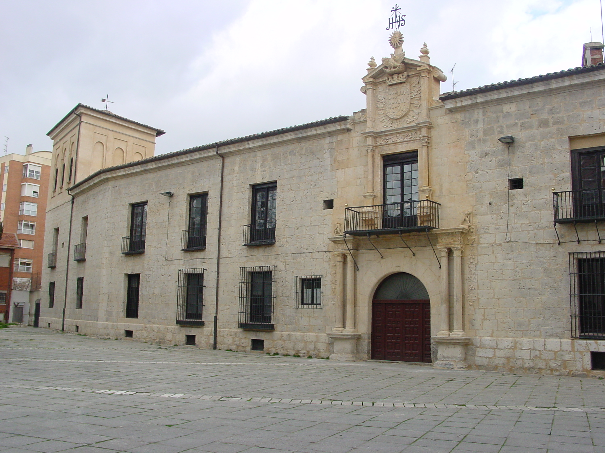 Casa-palacio del conde de Gondomar en Valladolid, España. Este edificio es conocido también como Casa del Sol.